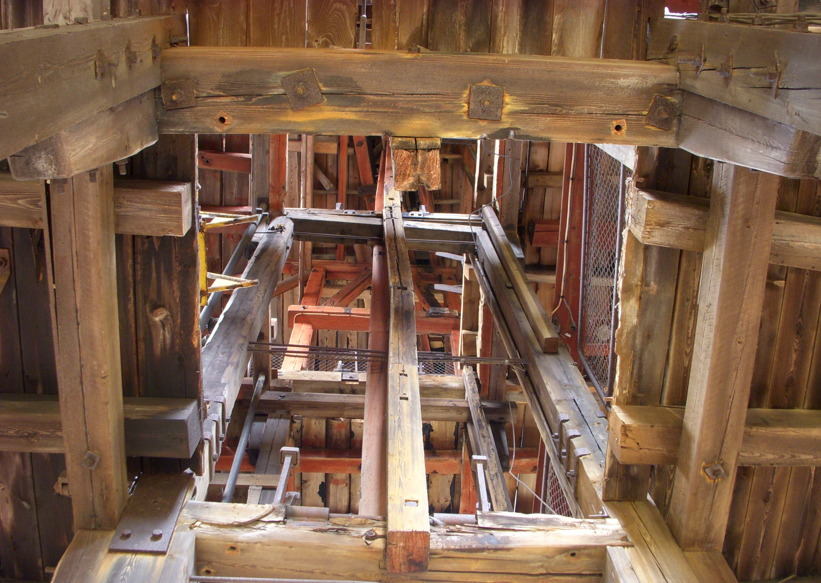 Bispbergs gruva, interiör, hisschakt